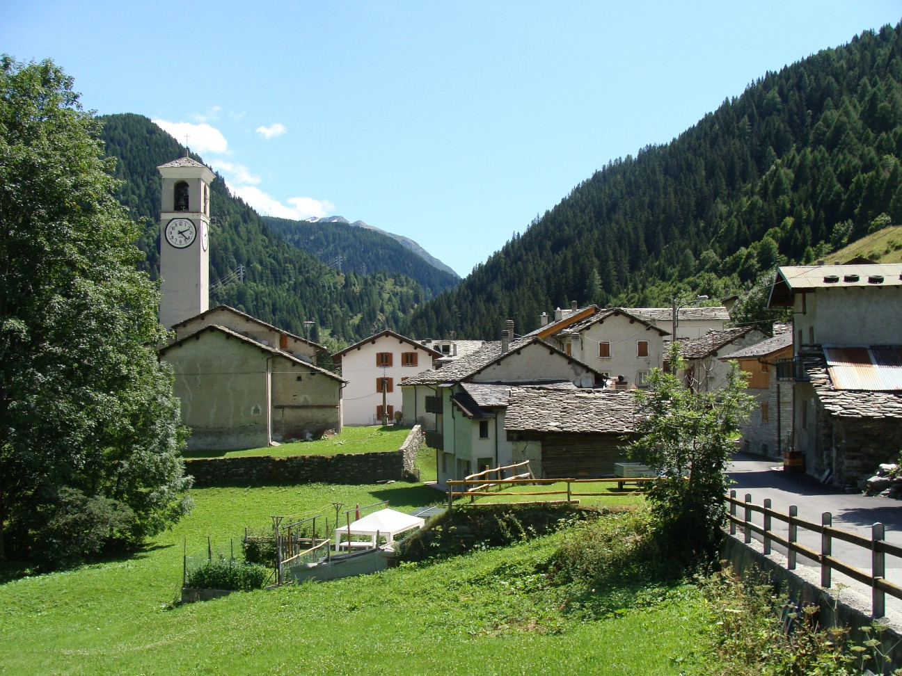 Isola